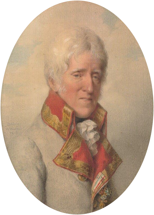 Albert, Herzog von Sachsen - Teschen (1738-1822), Gründer der Albertina, in weisser Feldmarschalluniform, mit dem Orden vom Goldenen Vlies